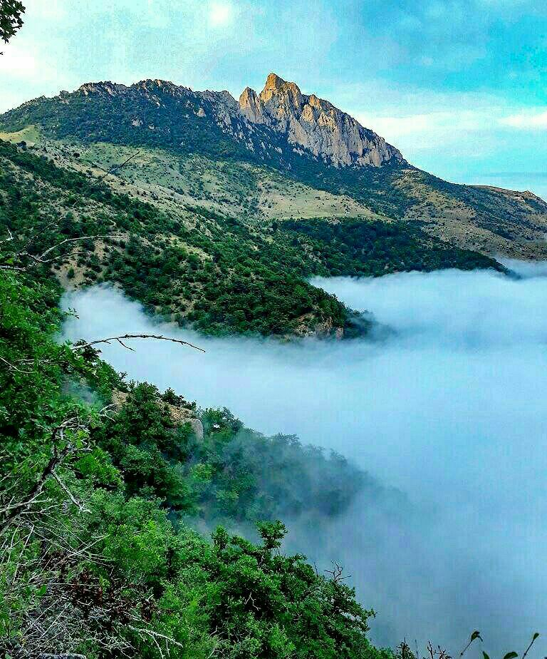 شاهدژ